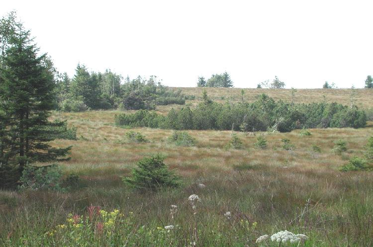 Hochmoorfläche auf der Hornisgrinde (Naturschutzgebiet) Foto: M. Linnenbach GNU-FDL